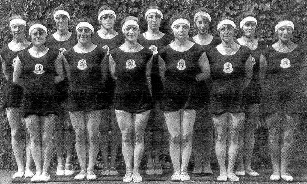 Turnerinnen der Goldriege von 1928. Sommerolympiade 1928 in Amsterdam. Lea Nordheim, Anna (Ans) Polak, Estella Agsteribbe, Judikje Simons, Gerrit Kleerekoper, Elka de Levie